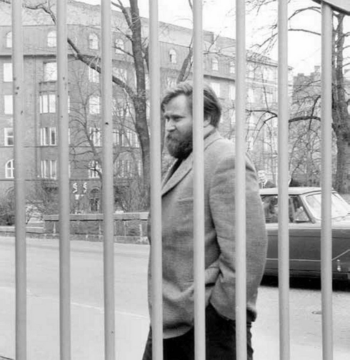 Hannu Salama saapumassa Helsingin hovioikeuteen Juhannustanssit-oikeudenkäyntiin. Tuomioistuin sijaitsi tuolloin Kaivopuistossa, niin kutsutussa Marmoripalatsissa.